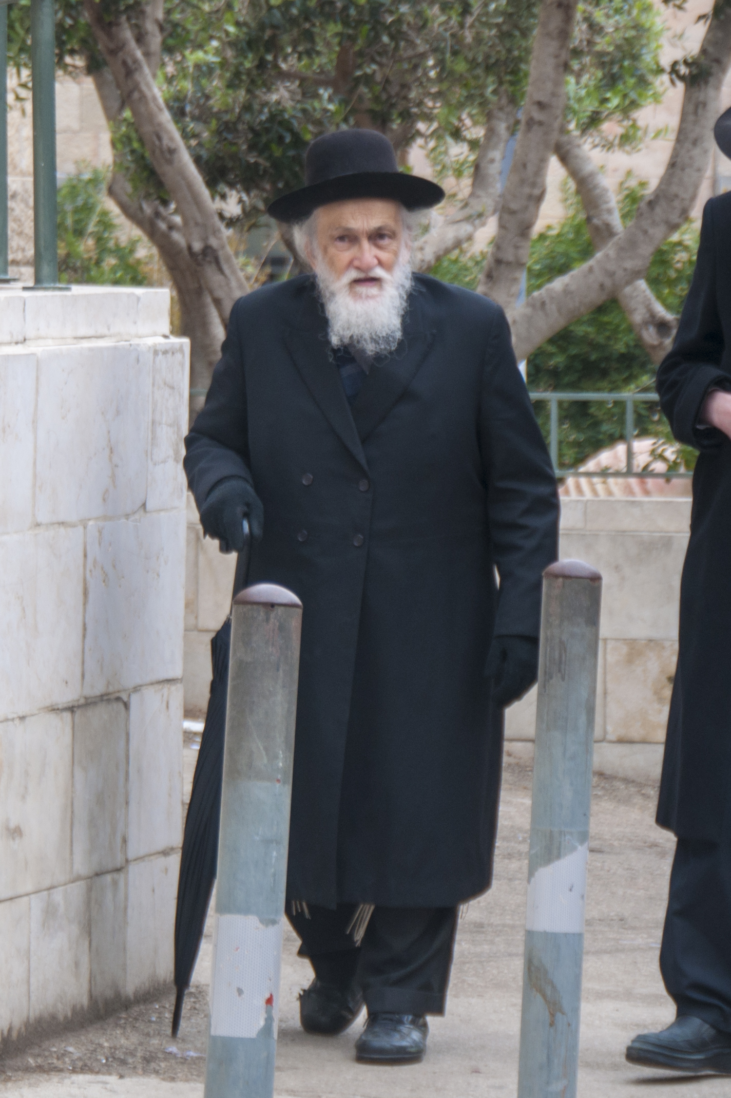 רבי מאיר סולובייצ'יק